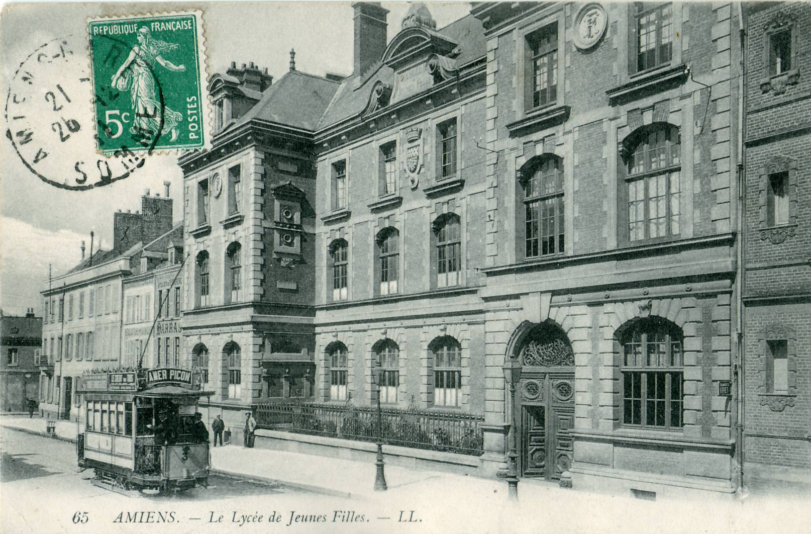 Carte postale ancienne éditée par LL N° 65AMIENS : Le Lycée de Jeunes filles, au Rue des Otages, devenue Lycée Madeleine Michelis, au 43 rue des Otages (49.889110, 2.302770)Vue d'un tramway d'Amiens, passant dans la Rue des Otages.